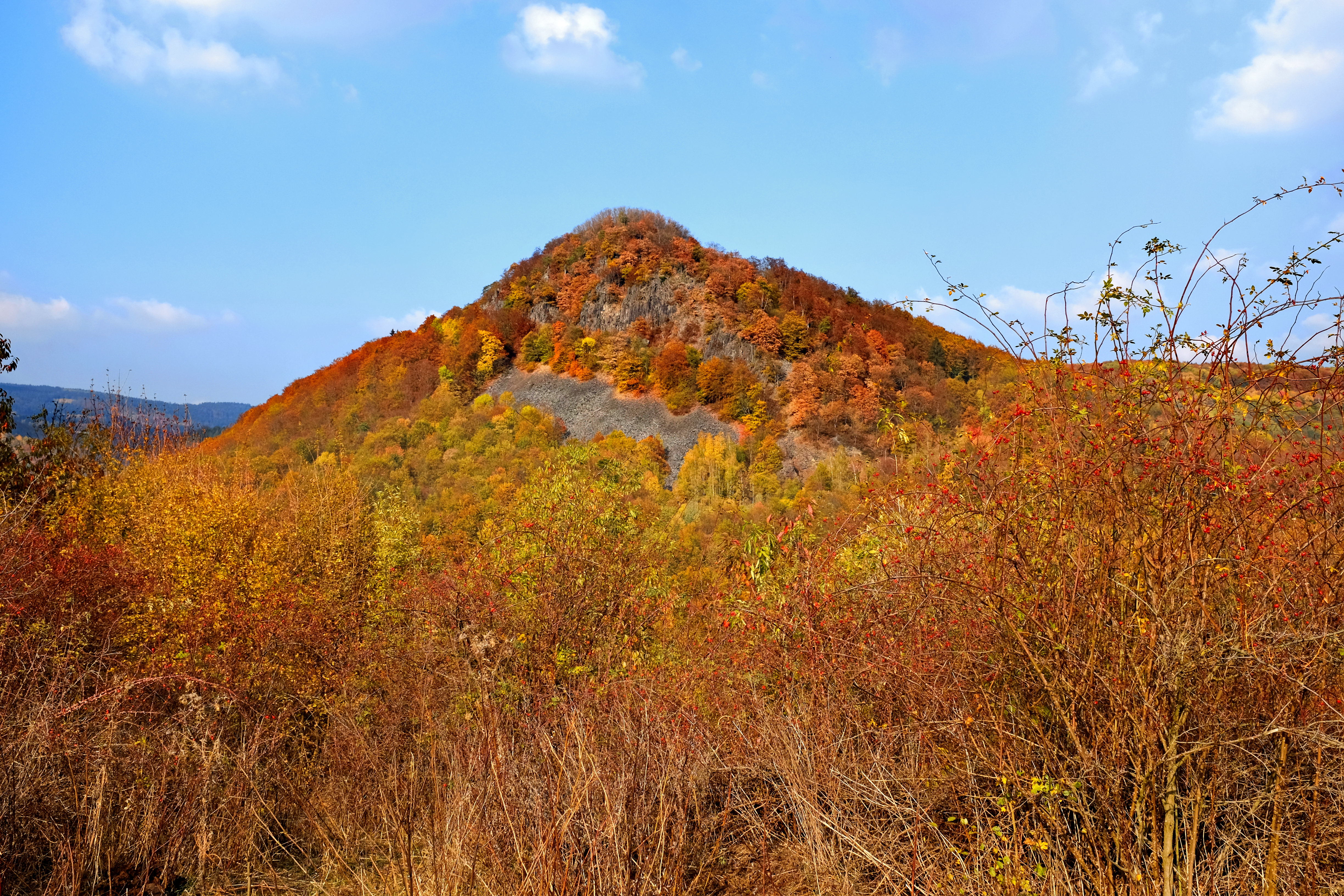 Vrch Nebesa (638 m), pohled od jihu, Doupovské hory, okres Karlovy Vary